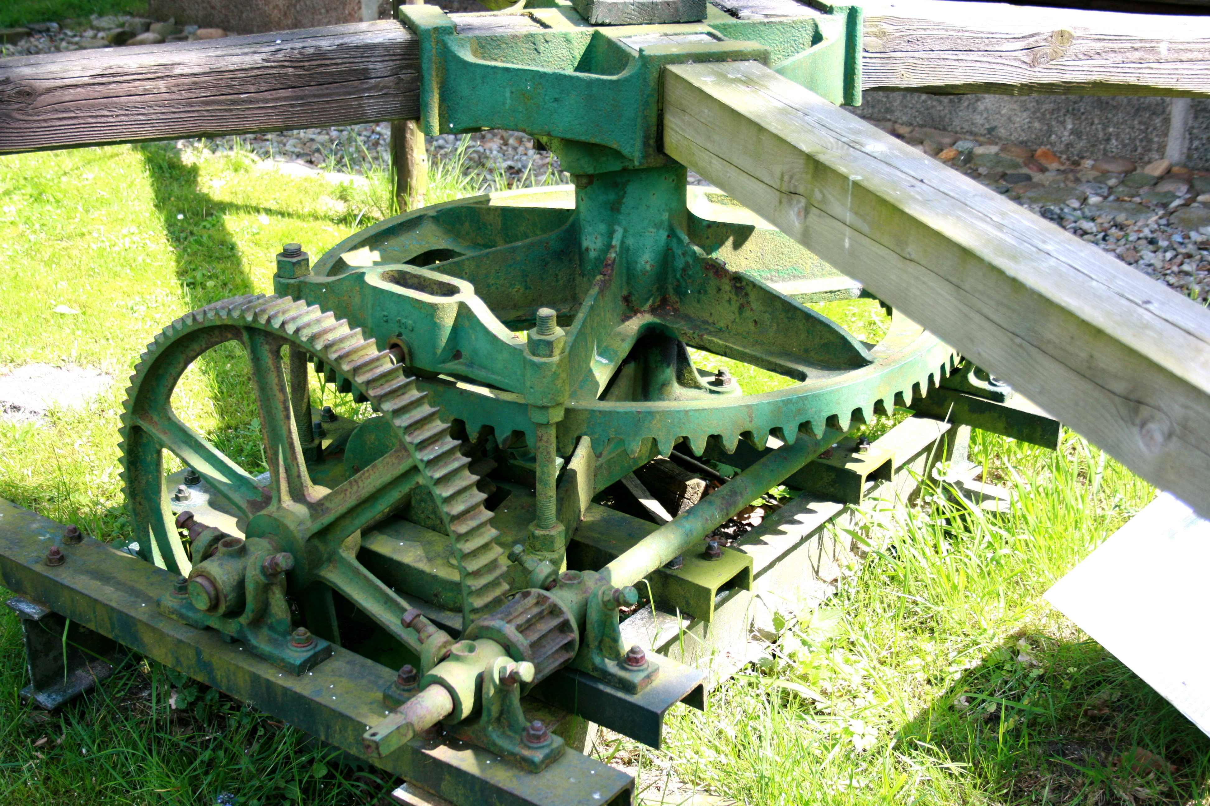 Schröers-Hof, Kirchstraße in Neuenkirchen (Lüneburger Heide)